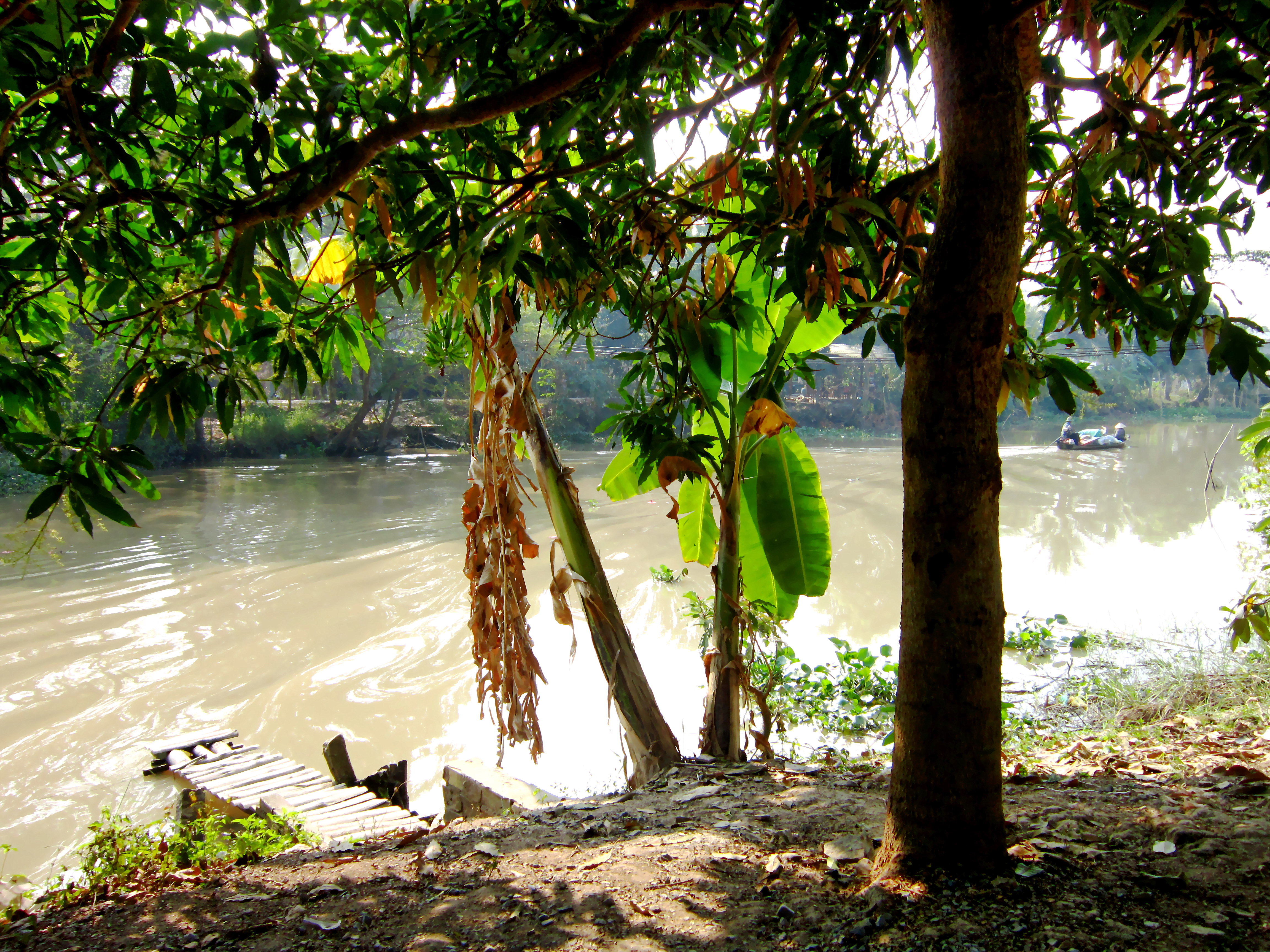 Chỗ cây da bến ngự khi xưa. Tục truyền, đây là nơi chúa Nguyễn Phúc Ánh ngôi câu cá khi đến ở Nước Xoáy; nay thuộc ấp Hưng Mỹ Tây, xã Long Hưng A, huyện Lấp Vò, Đồng Tháp, Việt Nam.